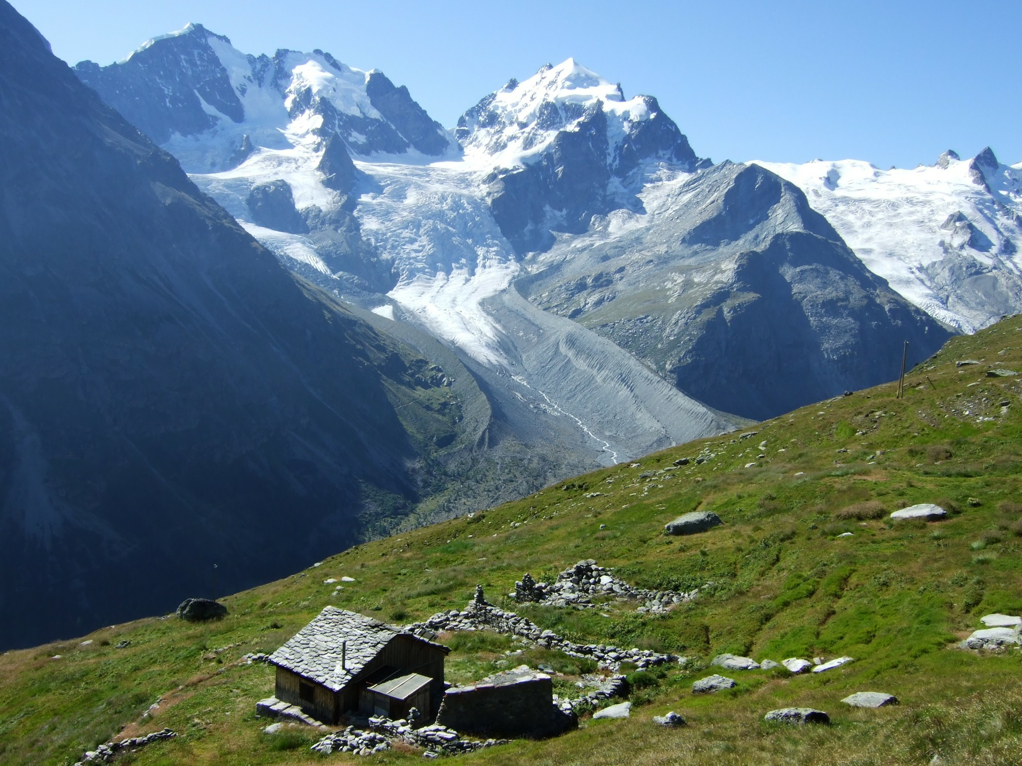 Blick auf den Tschiervagletscher beim Aufstieg zur Fuorcla Surlej, Graubünden, Schweiz, im August 2007